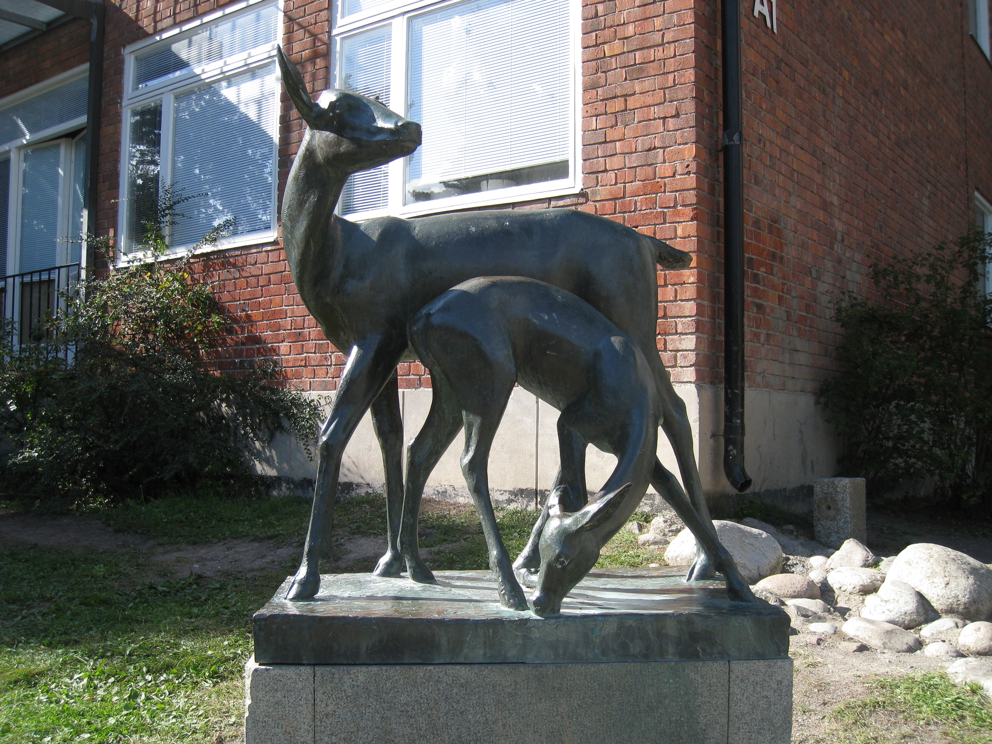 "Hjorthind med kalv" av den norske skulptören Arne N. Vigeland (1900-1983), brons, 1951. Skulpturen står på skolgården vid Blackebergsskolan i Bromma